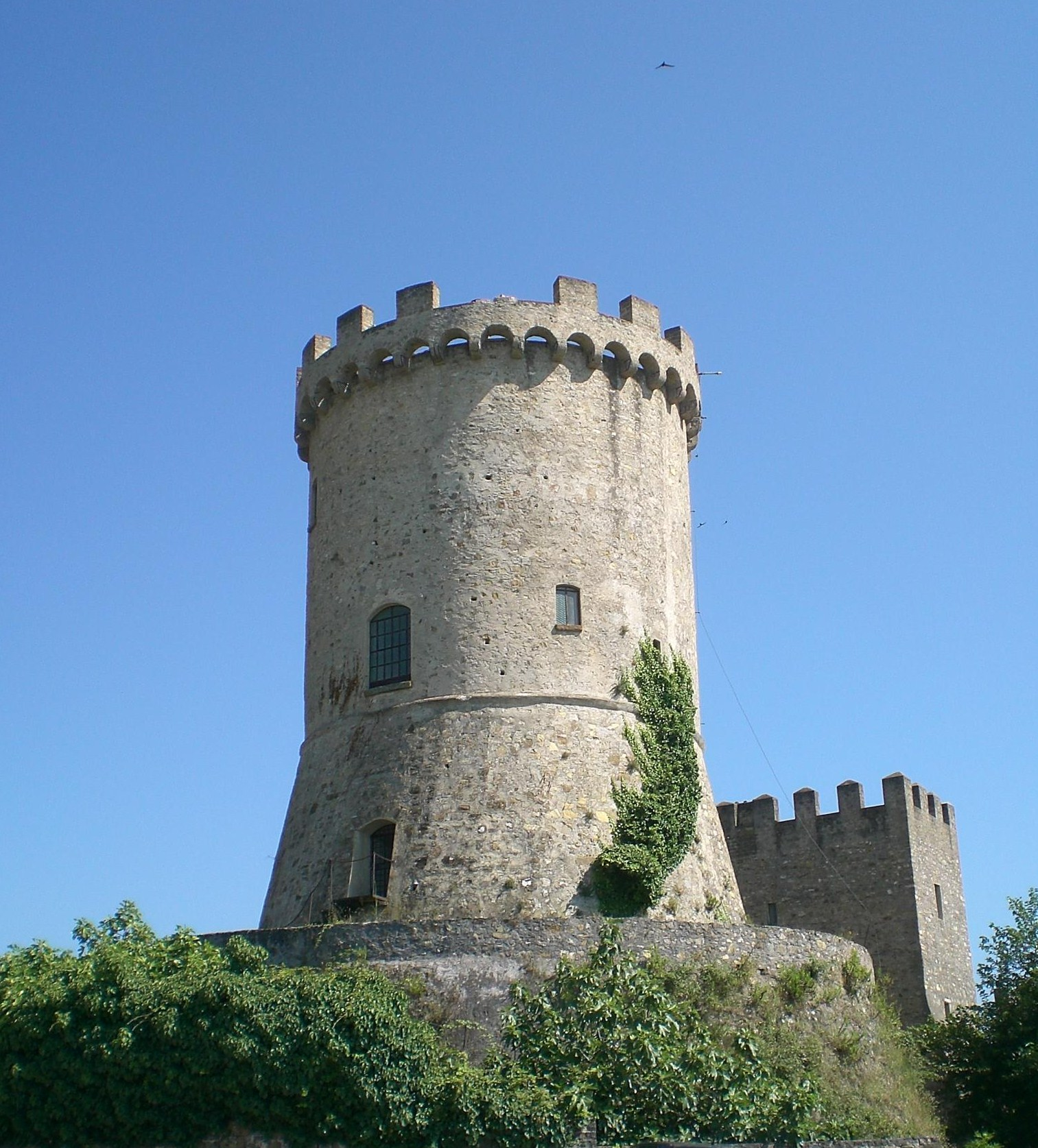 Torre del castello Talamo-Atenolfi di Castelnuovo Cilento